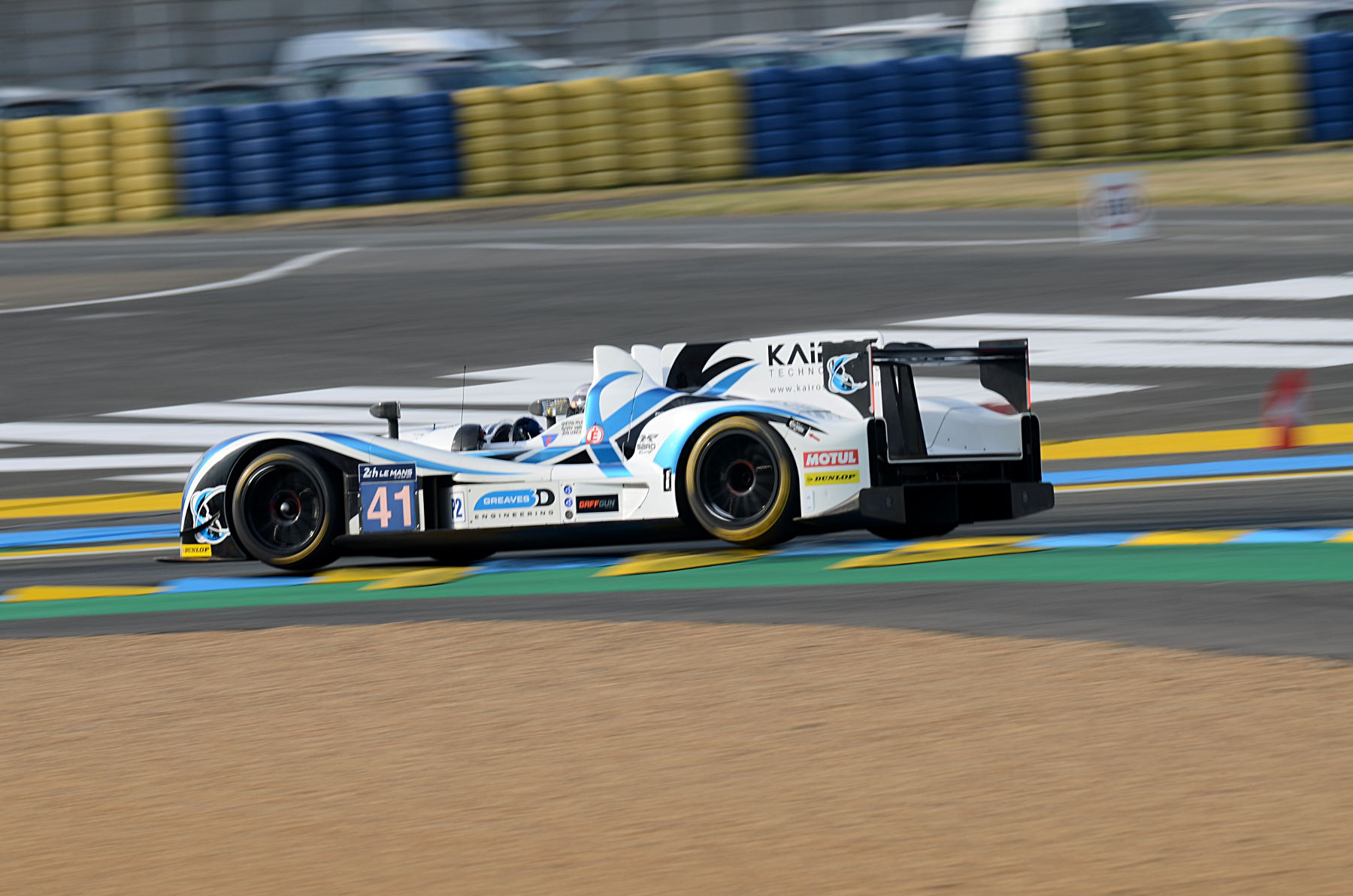 La Gibson 015S - Nissan de l'écurie Greaves Motorsport pilotée par Gary Hirsch, Gaëtan Paletou et Jon Lancaster lors des 24 Heures du Mans 2018